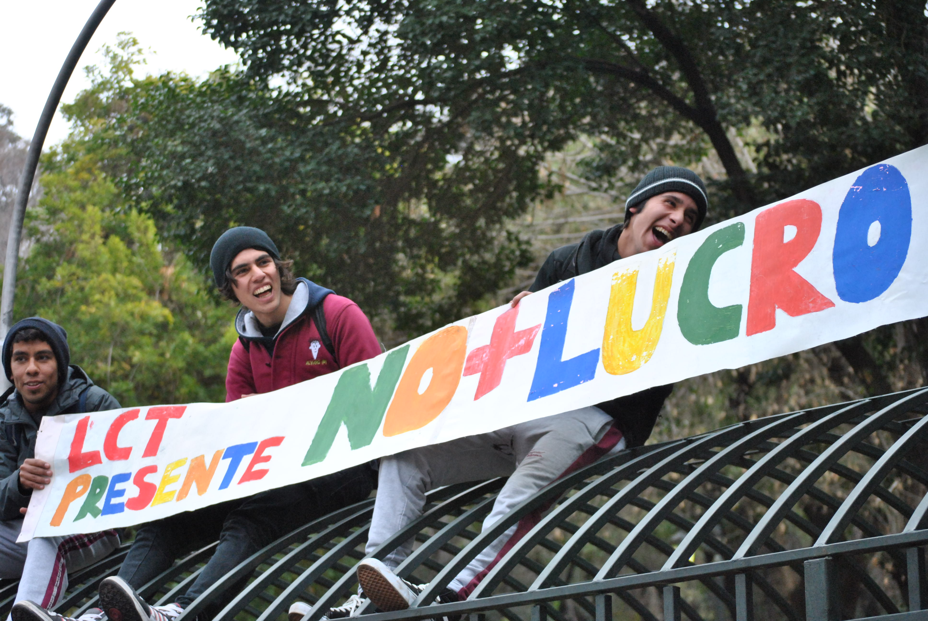 Movilización estudiantil de 2011 en Chile: marcha del 30 de junio de 2011.